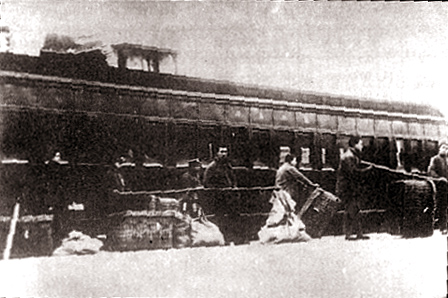 20世纪20年代的老宁波站